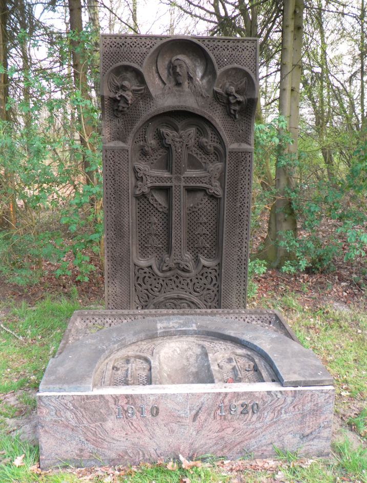 Armeens monument op begraafplaats De Boskamp in Assen